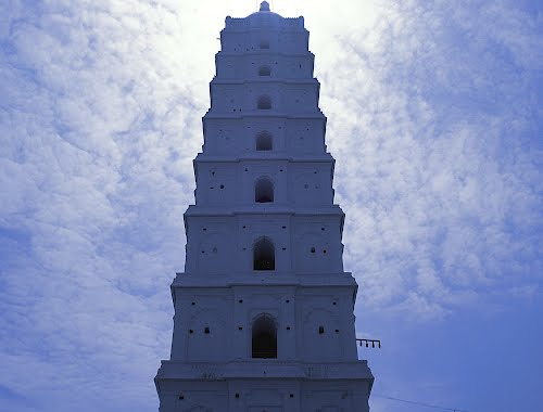 Nagore Dargah main Minaret, Tamilnadu, India